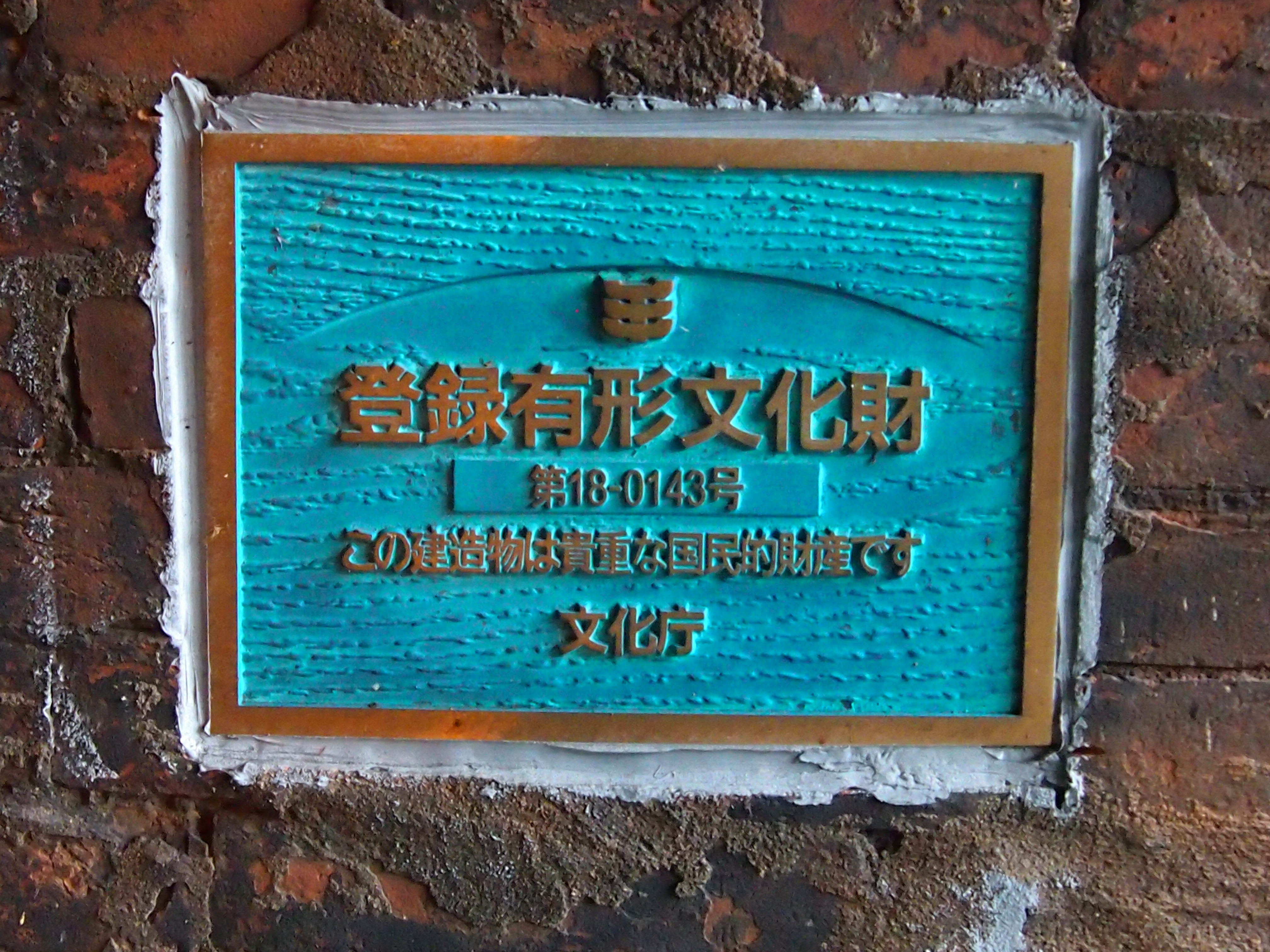 旧北陸線トンネル群の樫曲トンネルは国の登録有形文化財である。